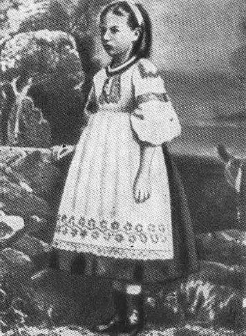 Young Nadezhda Krupskaya in 1876